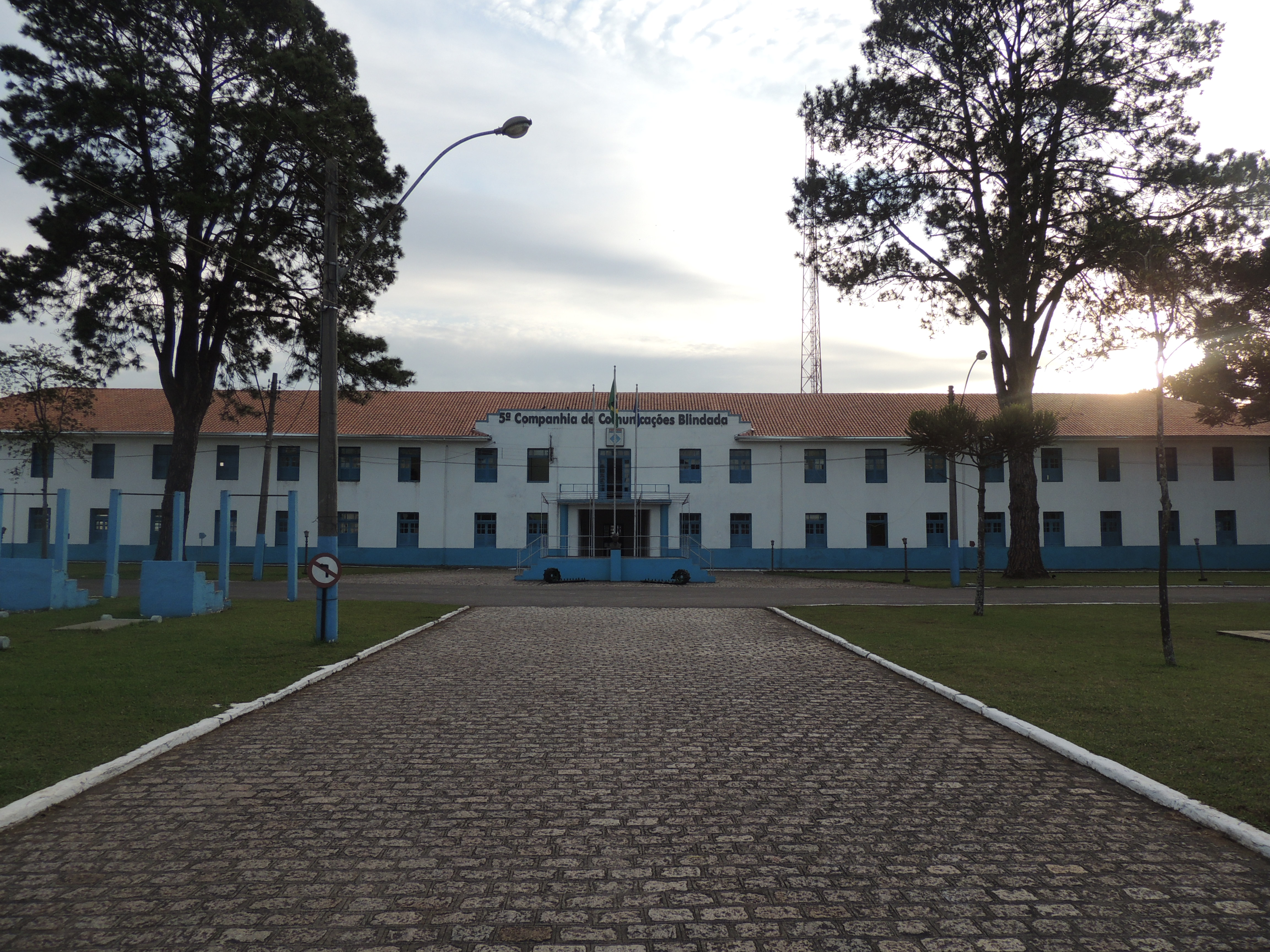 Fachada